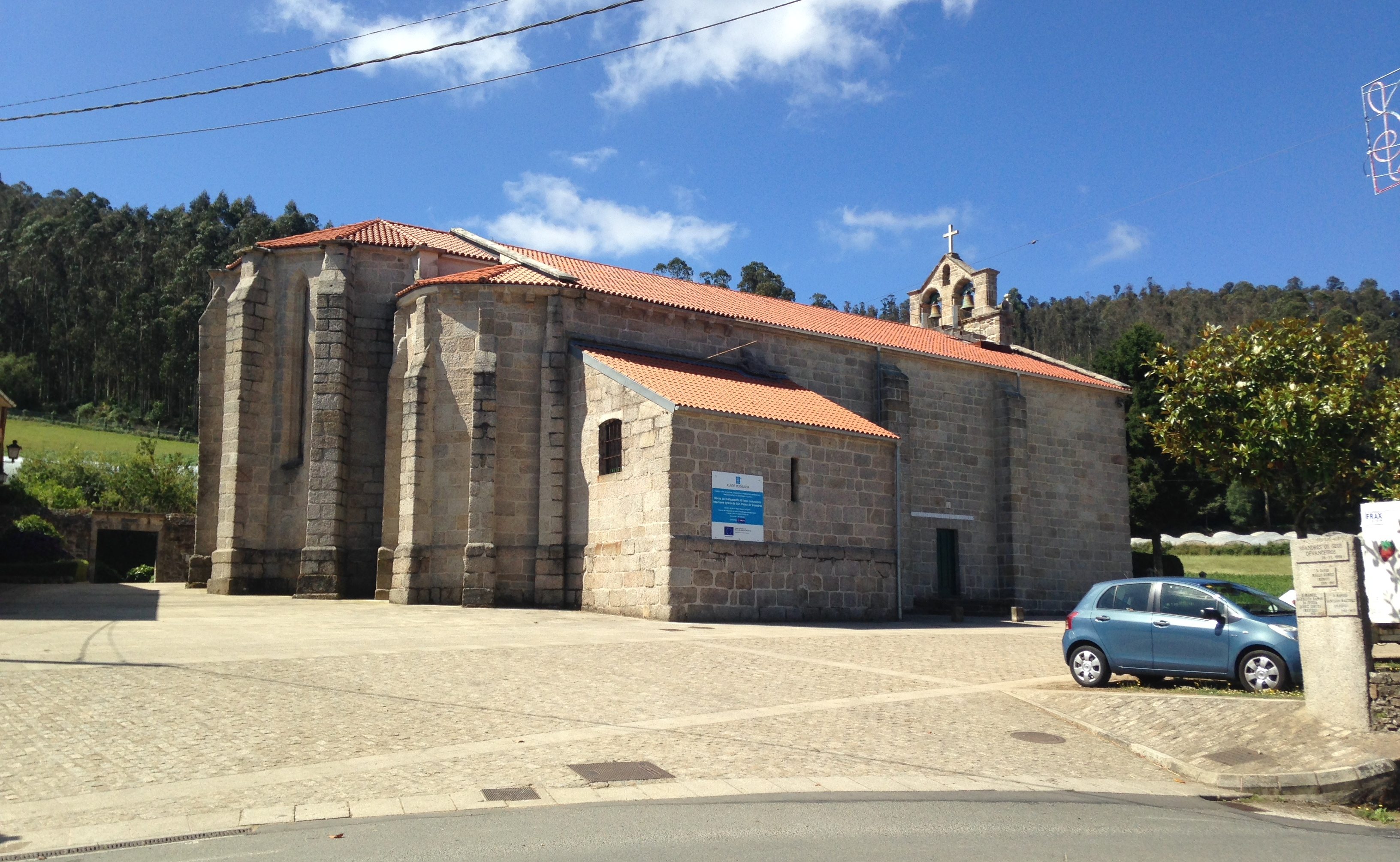 Igrexa do Mosteiro de Soandres, A Laracha.